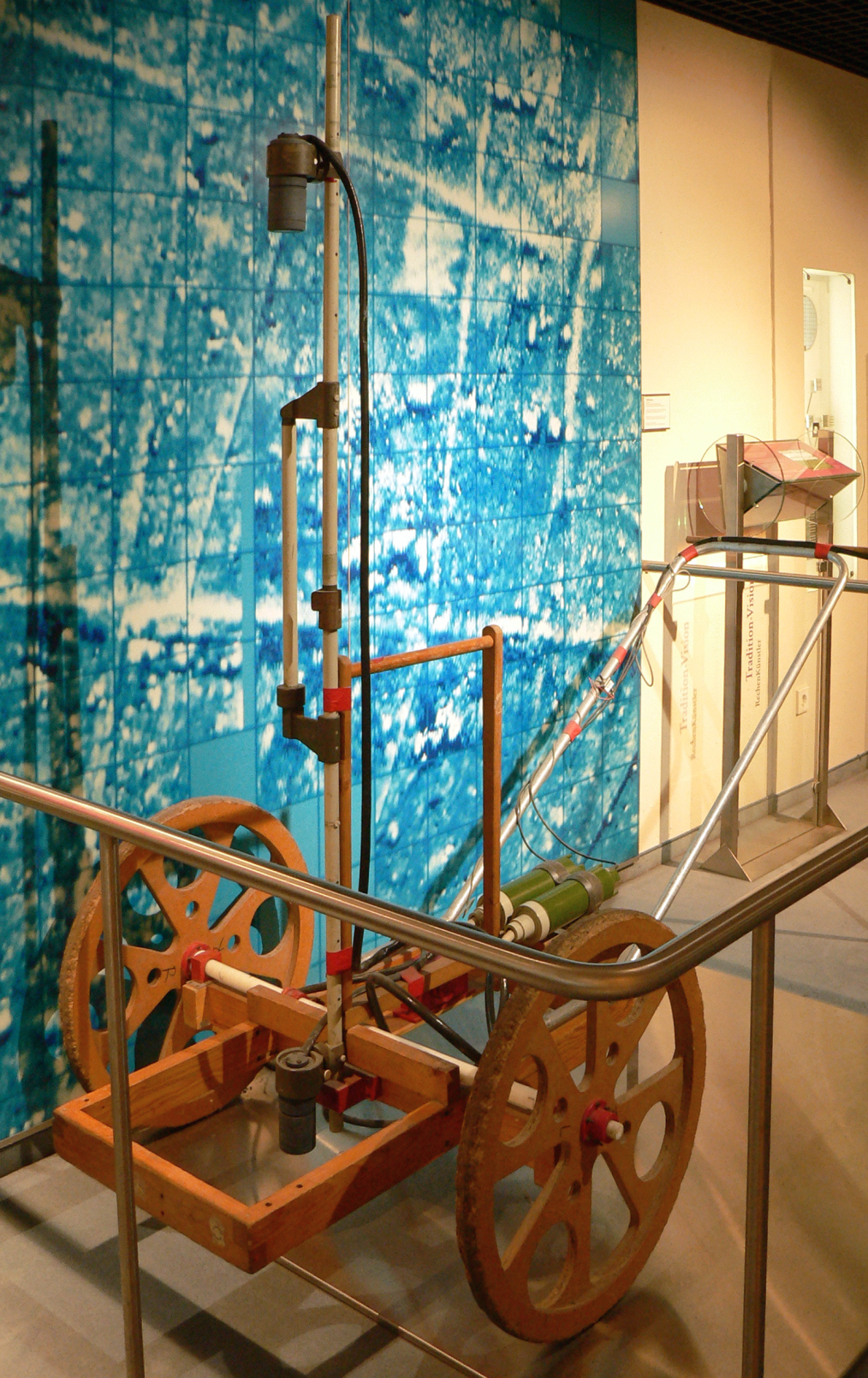 Deutsches Museum Bonn, Cäsium Magnetometer mit dem ab 1992 Untersuchungen in Troja stattfanden und deren Ergebnisse auf eine große Unterstadt deuteten